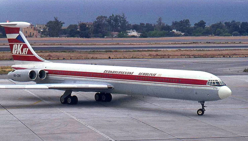 Iľjušin Il-62 OK-ZBC od Československých aerolinií na letisku v Aténach